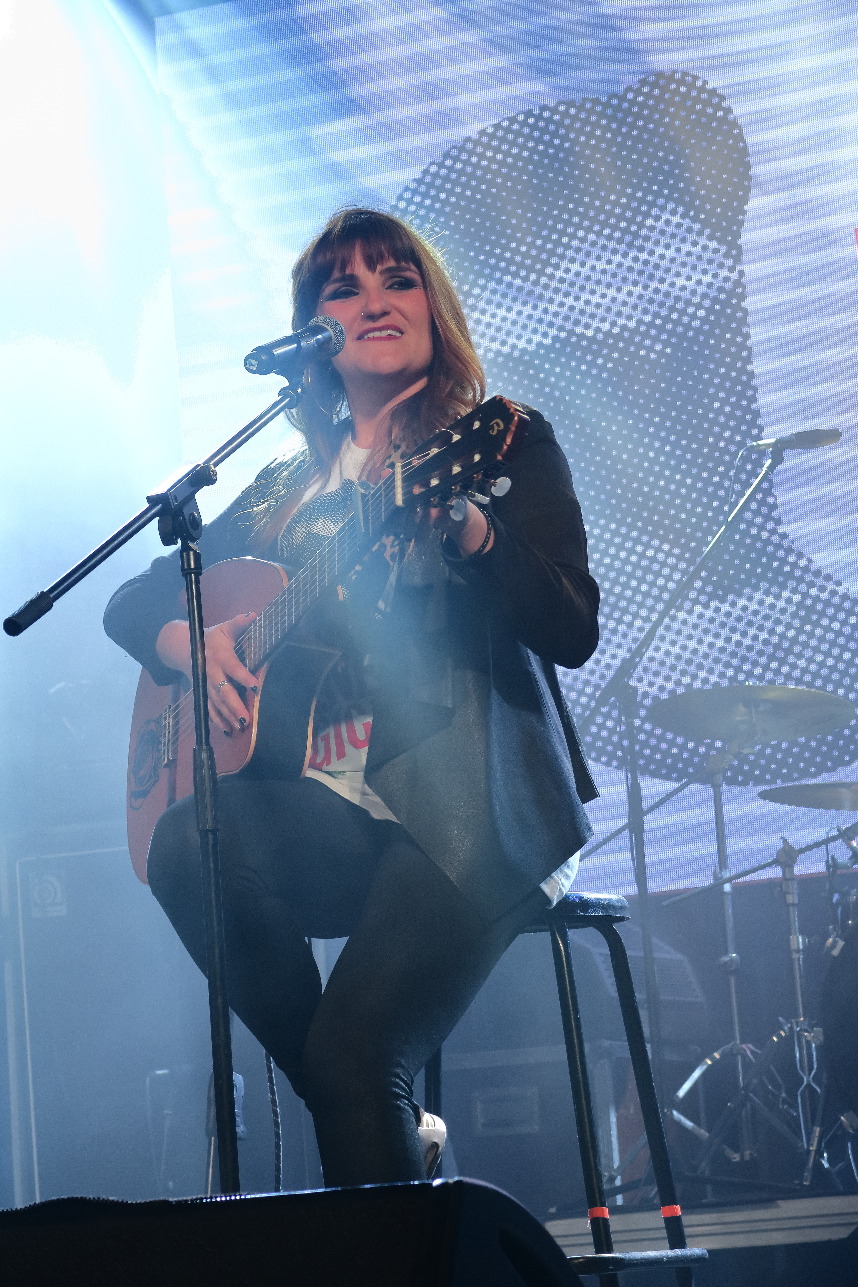 Rozalén, Concierto Enérgicas de Greenpeace, Mujeres en Concierto por la Revolución Energética, Sala la Riviera, Madrid 2018